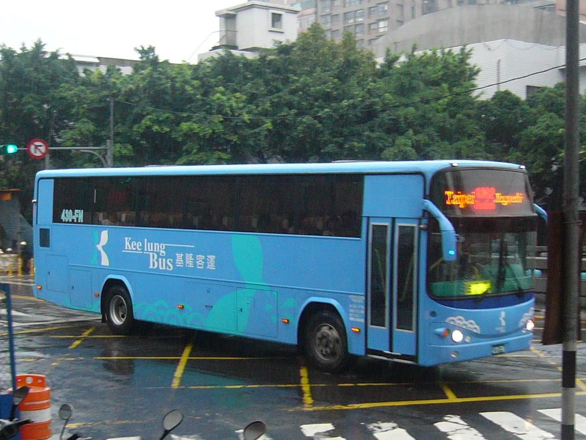 基隆客運日野RN8JRSA大客車430-FN，雨中行駛1062線，行經臺北市八德路四段。